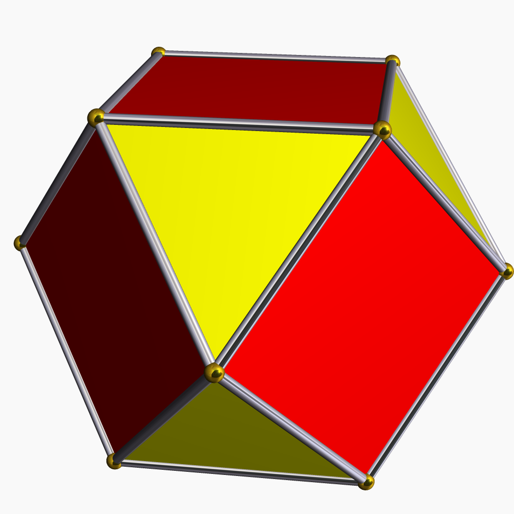 Image d'un cuboctaèdre